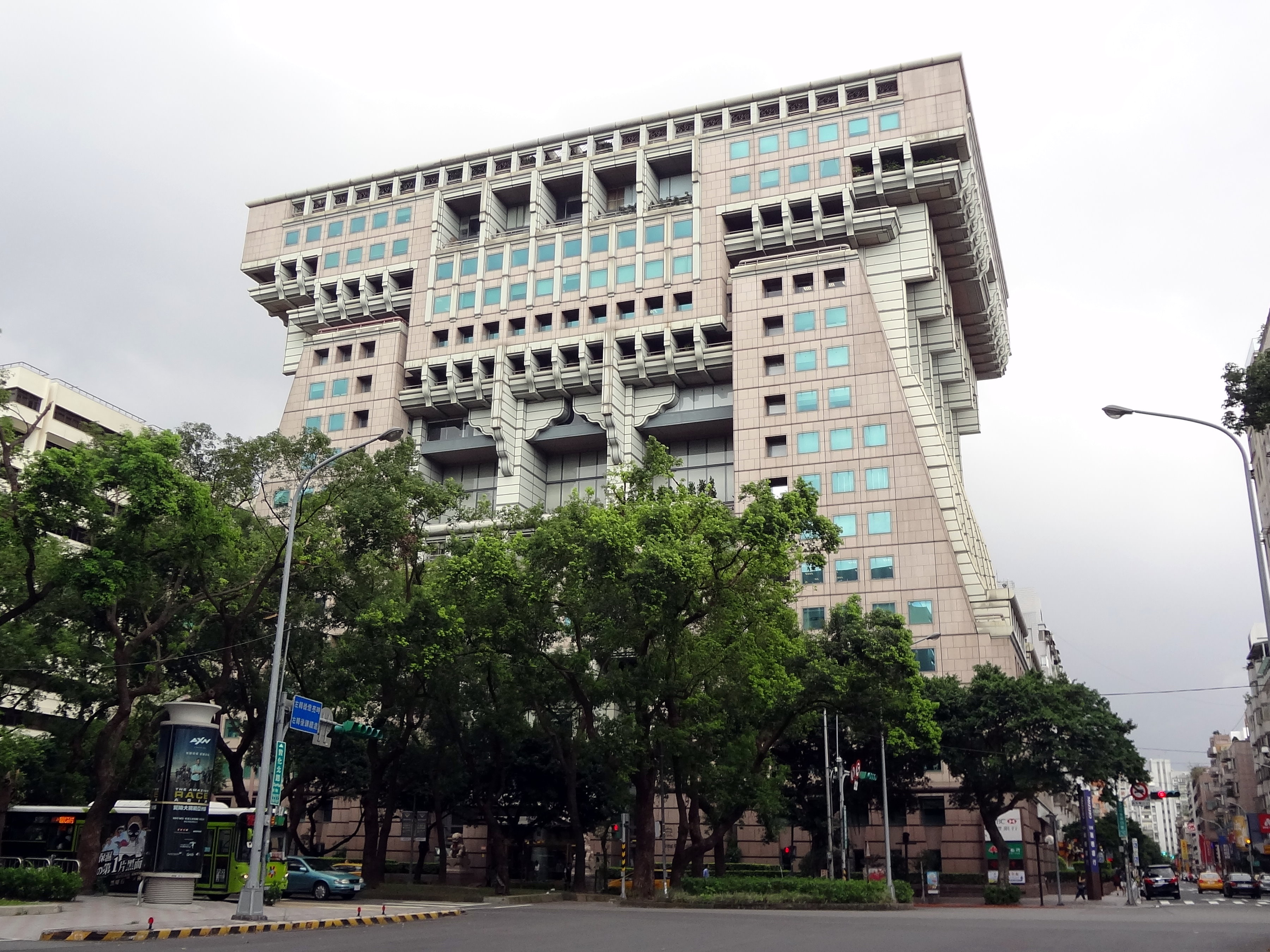 宏國大樓，位於臺北市松山區敦化北路167號。